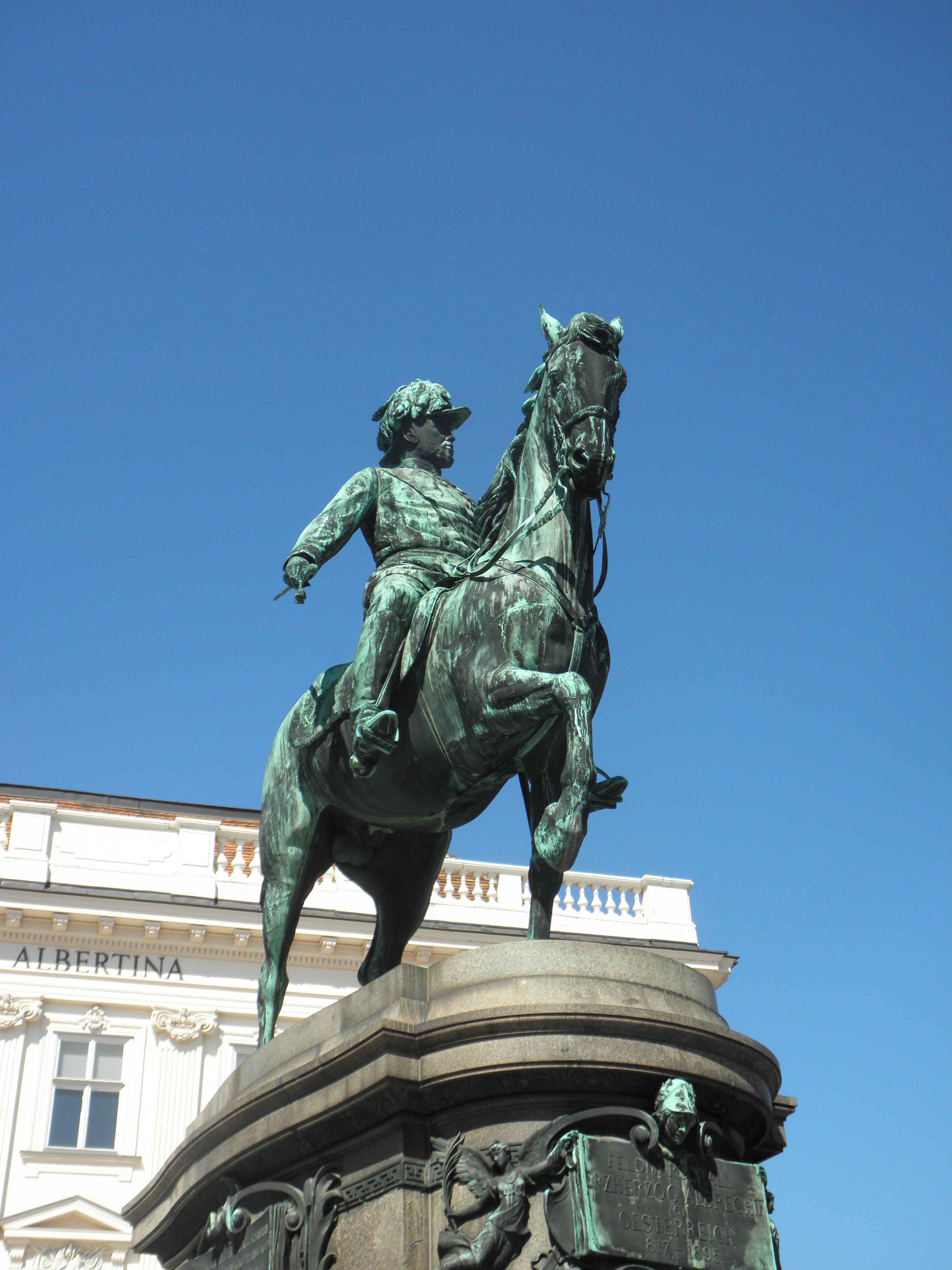 Erzherzog Albrecht-Denkmal auf der Albrechtsrampe